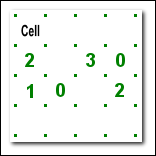 Egen teckning